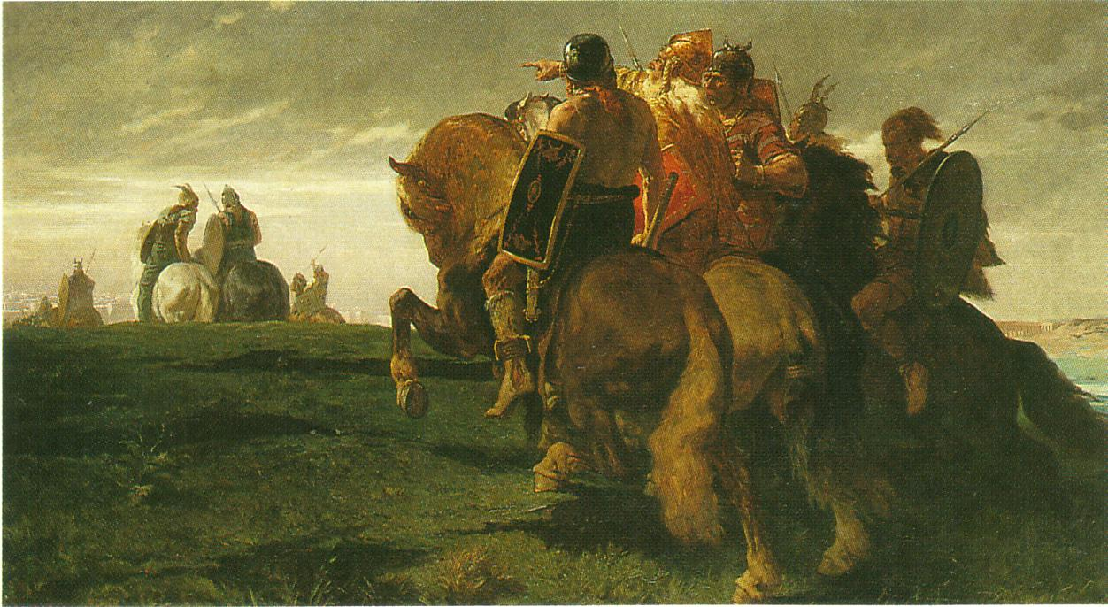 « Gaulois en vue de Rome », huile sur toile d'Evariste-Vital Luminais (Nantes, 1822 - Paris, 1896). Musée des Beaux-Arts de Nancy.